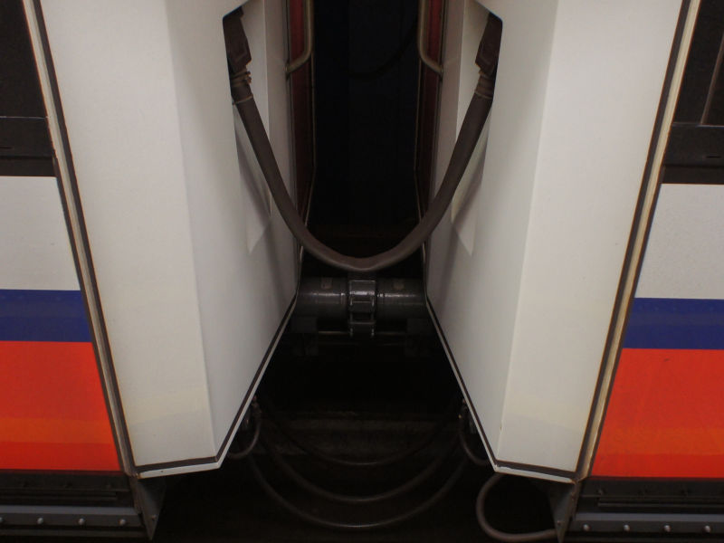 Sprzęg międzywagonowy elektrycznego zespołu trakcyjnego Alstom Metropolis 98B Metra Warszawskiego.